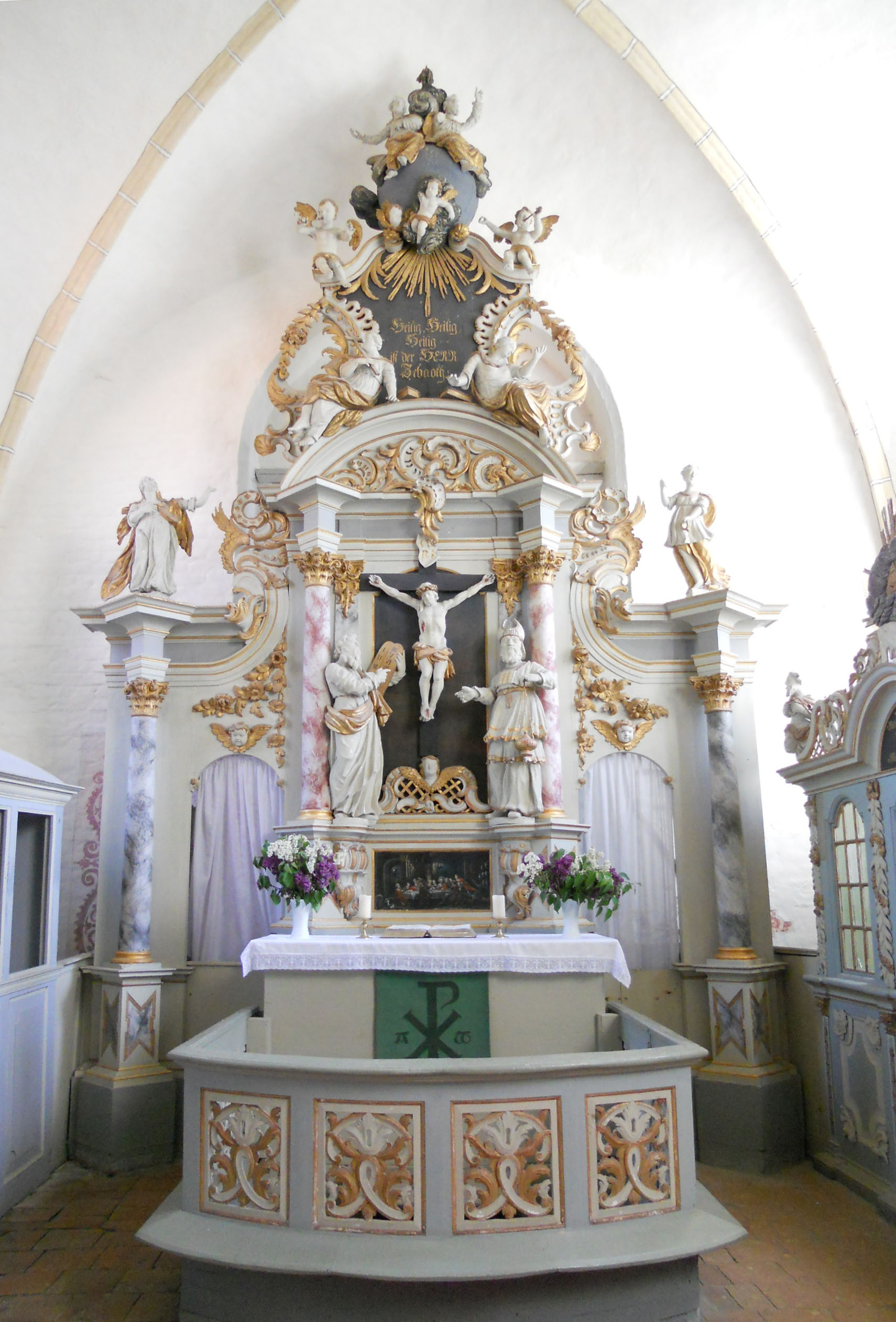 Altar der Katharinen Kirche in Trent